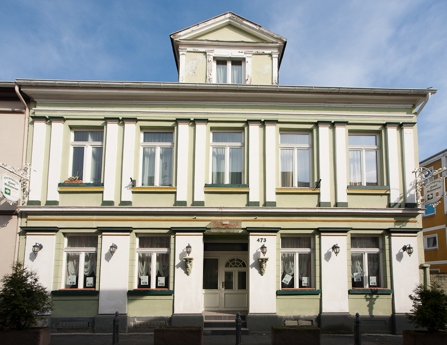 Denkmalgeschützter Putzbau in spätklassizistischen Formen (erbaut in zweiter Hälfte des 19. Jahrhunderts; Haus des 1841–1889 amtierenden Bürgermeisters August Mirbach), Hauptstraße 473, Königswinter